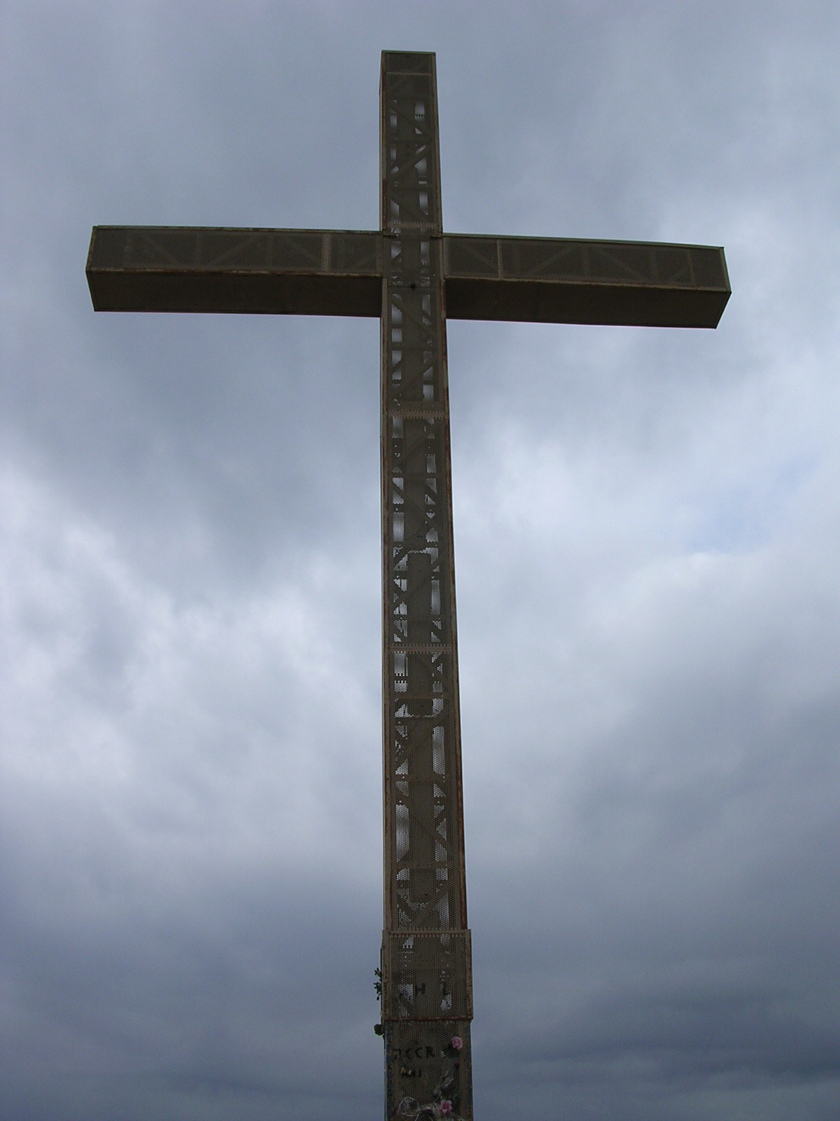 Benidorm